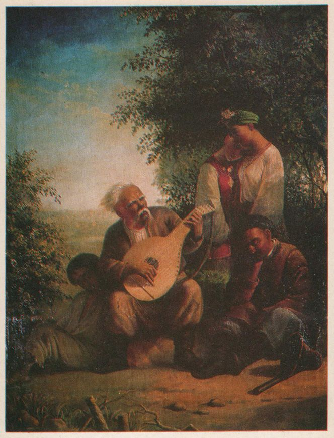 Д.І. Безперчий ( 1825-1913 ) . Бандурист . 1860 Полотно, олія . 125х98,2 см . Сумський художній музей